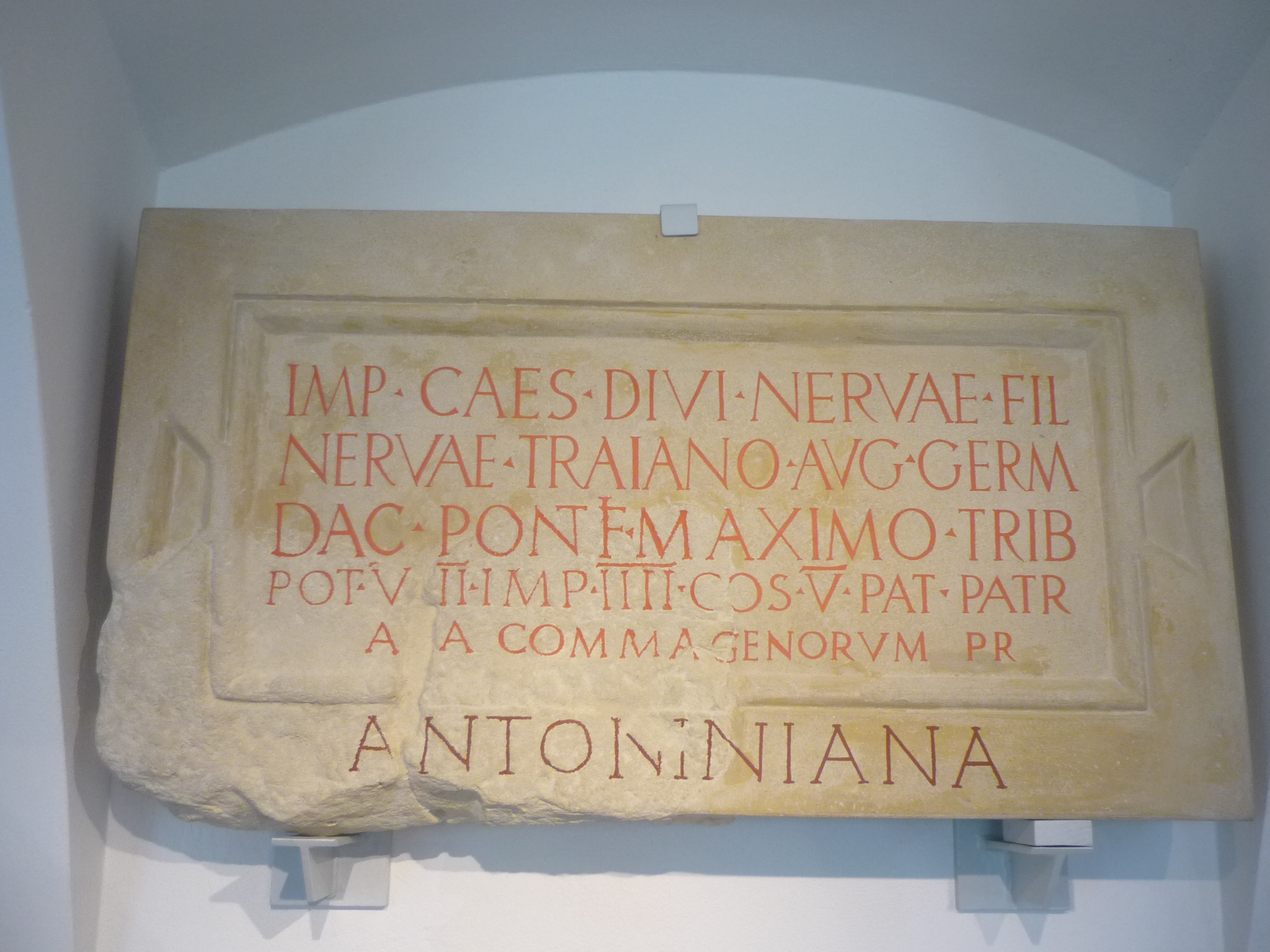 Rekonstruktion der Bauinschrift aus dem Kastell Comagena - Römisches Museum Tulln